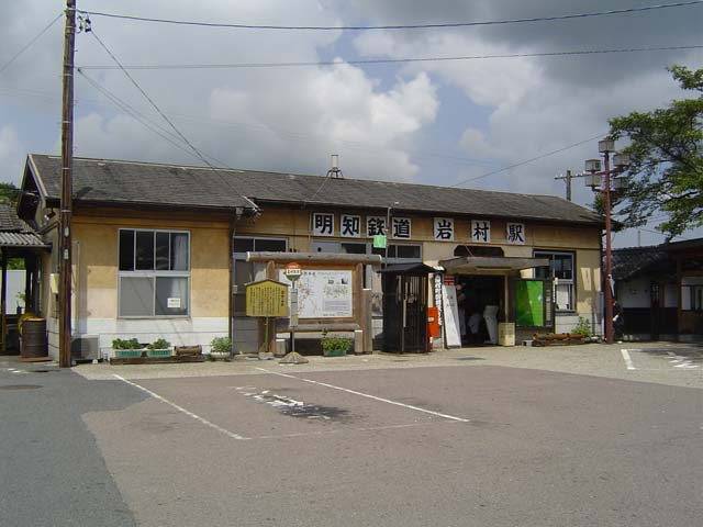 明知鉄道岩村駅舎（2004年8月8日） 投稿者(Kone)による撮影。